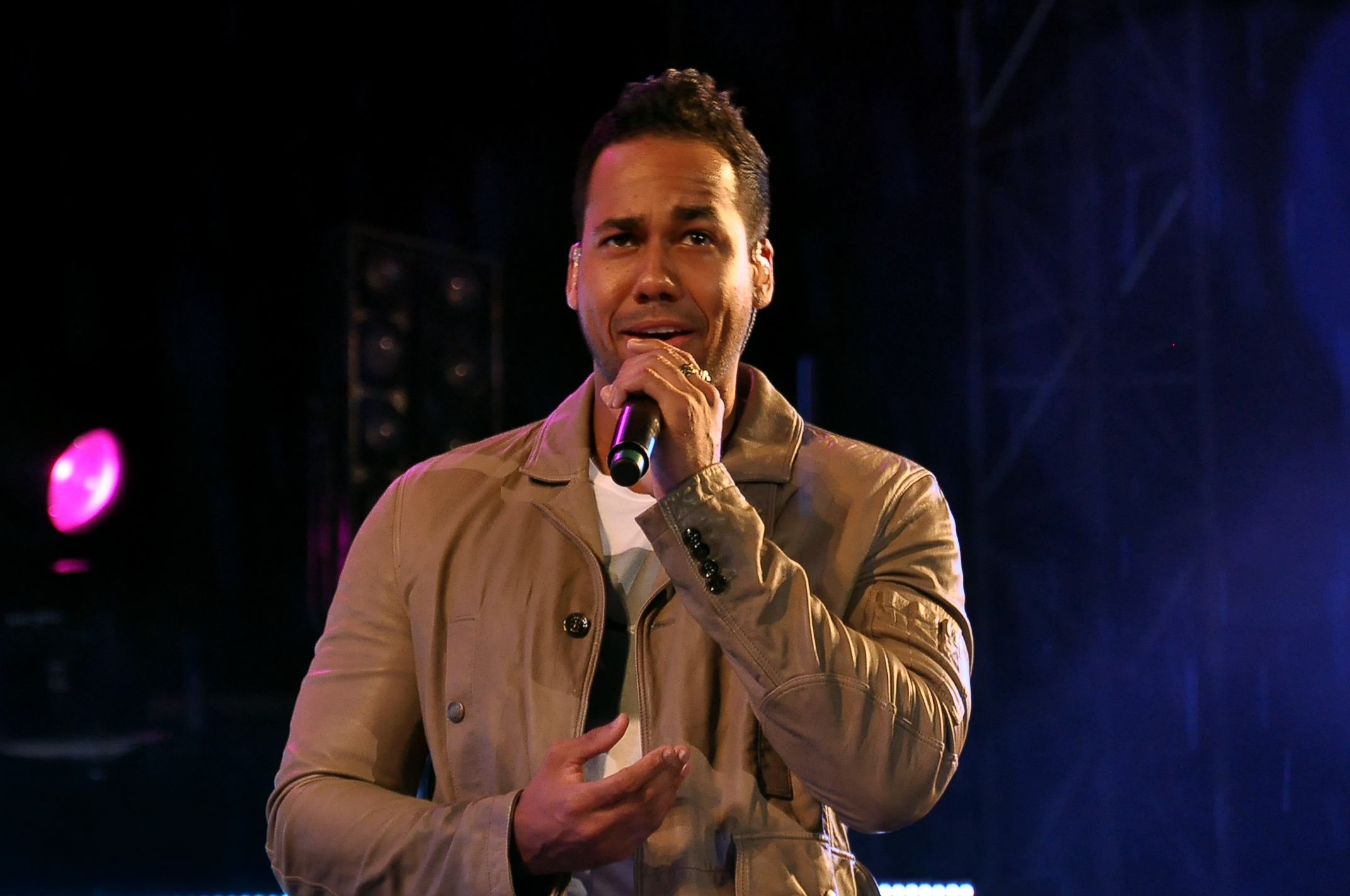 Anthony "Romeo" Santos, Estadio Olímpico Félix Sánchez, Santo Domingo 2012